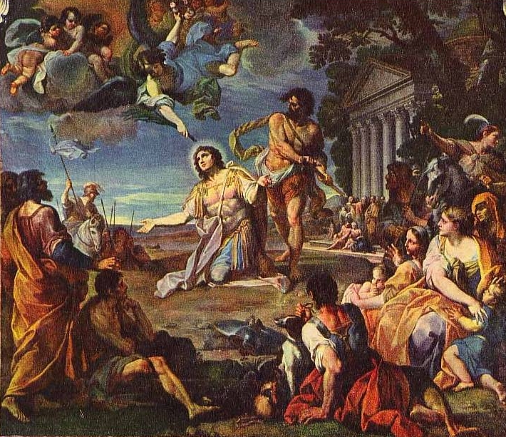 Ligure: "O martœuio de san Torpe'", Plaçido Constançi, œuio insce teja, dommo de Piza